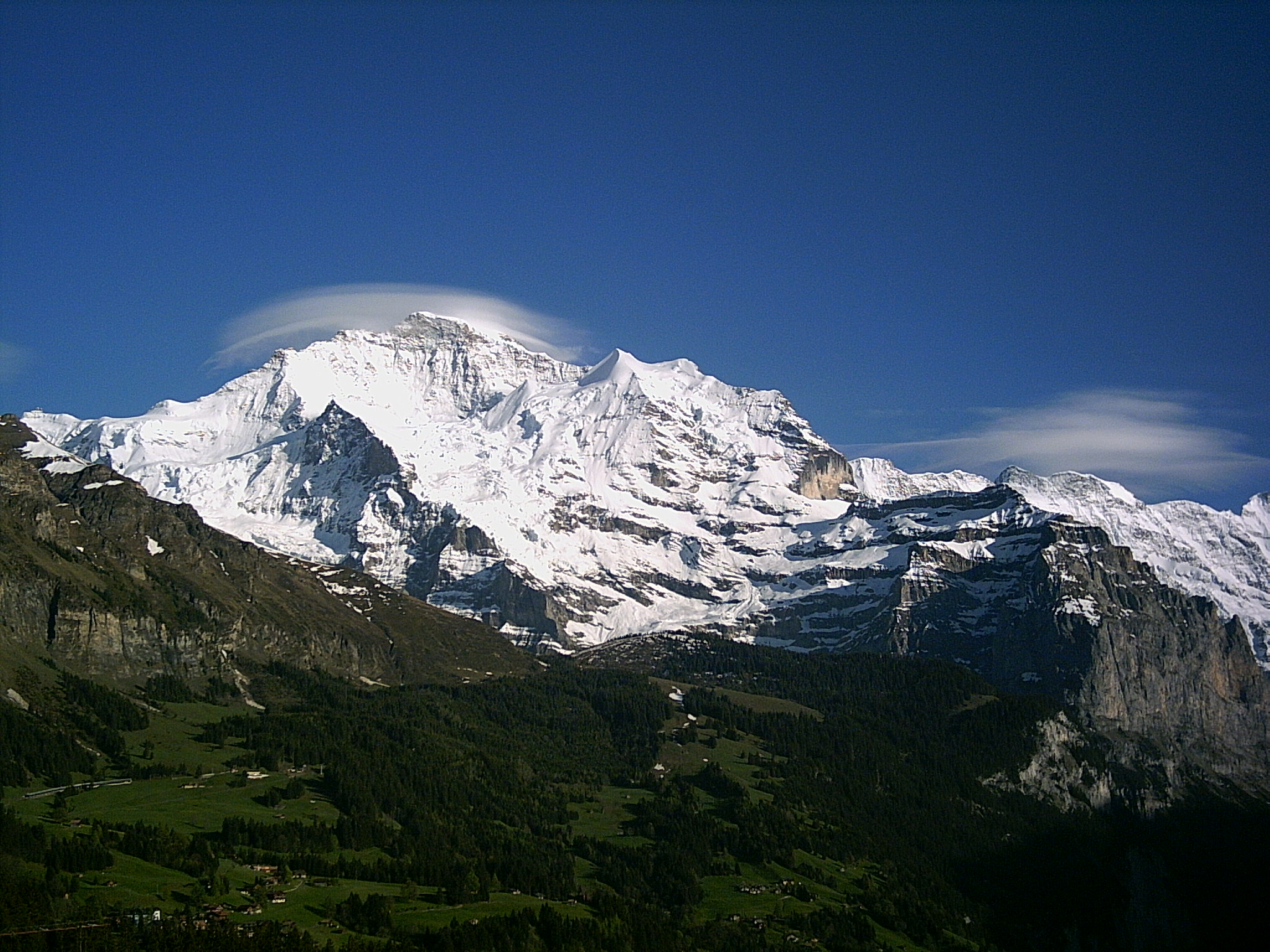 Jungfrau von Wengen aus gesehen